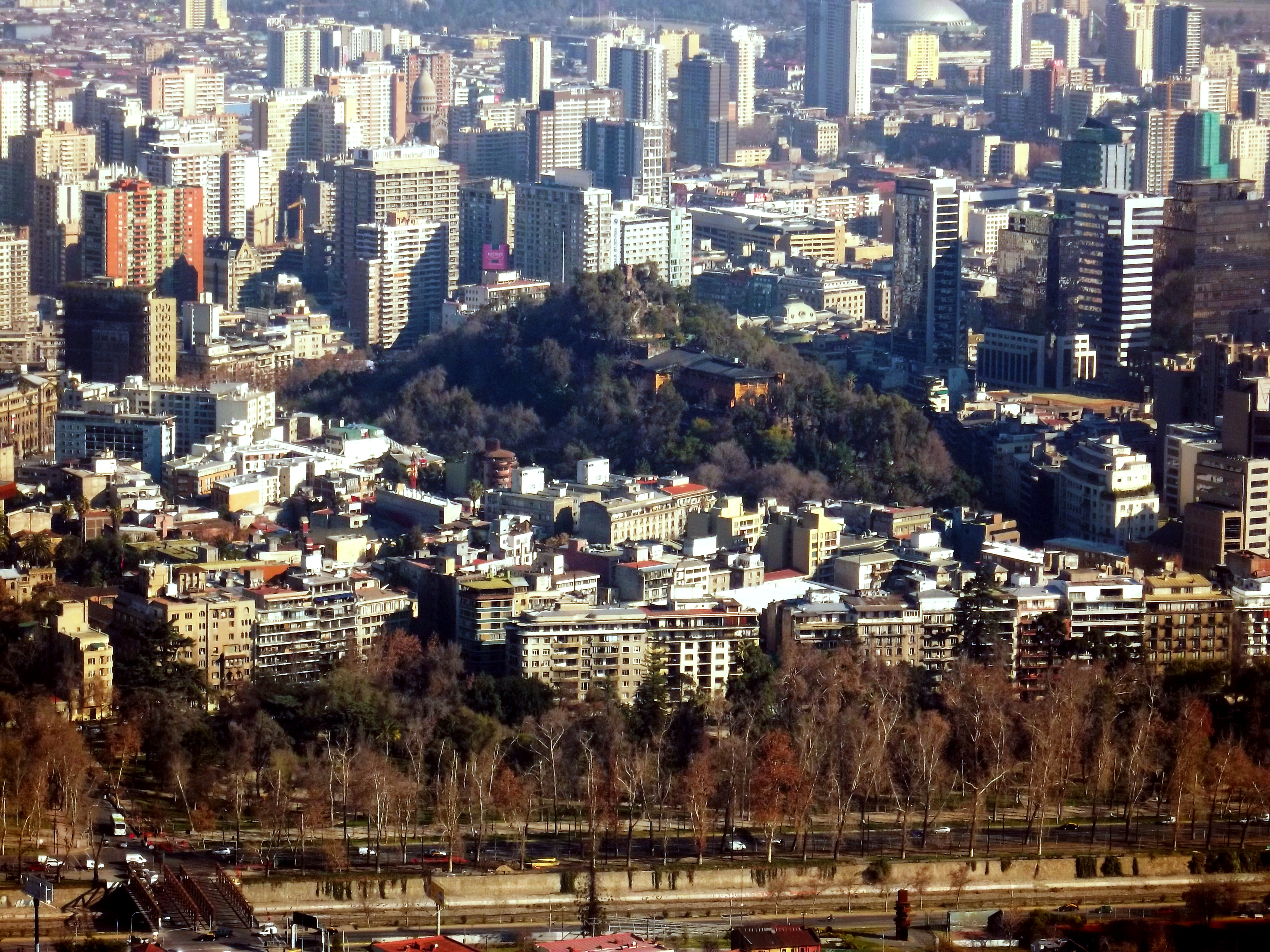 Cerro Santa Lucía desde el Cerro San Cristóbal en Santiago de Chile, Región Metropolitana, Chile.